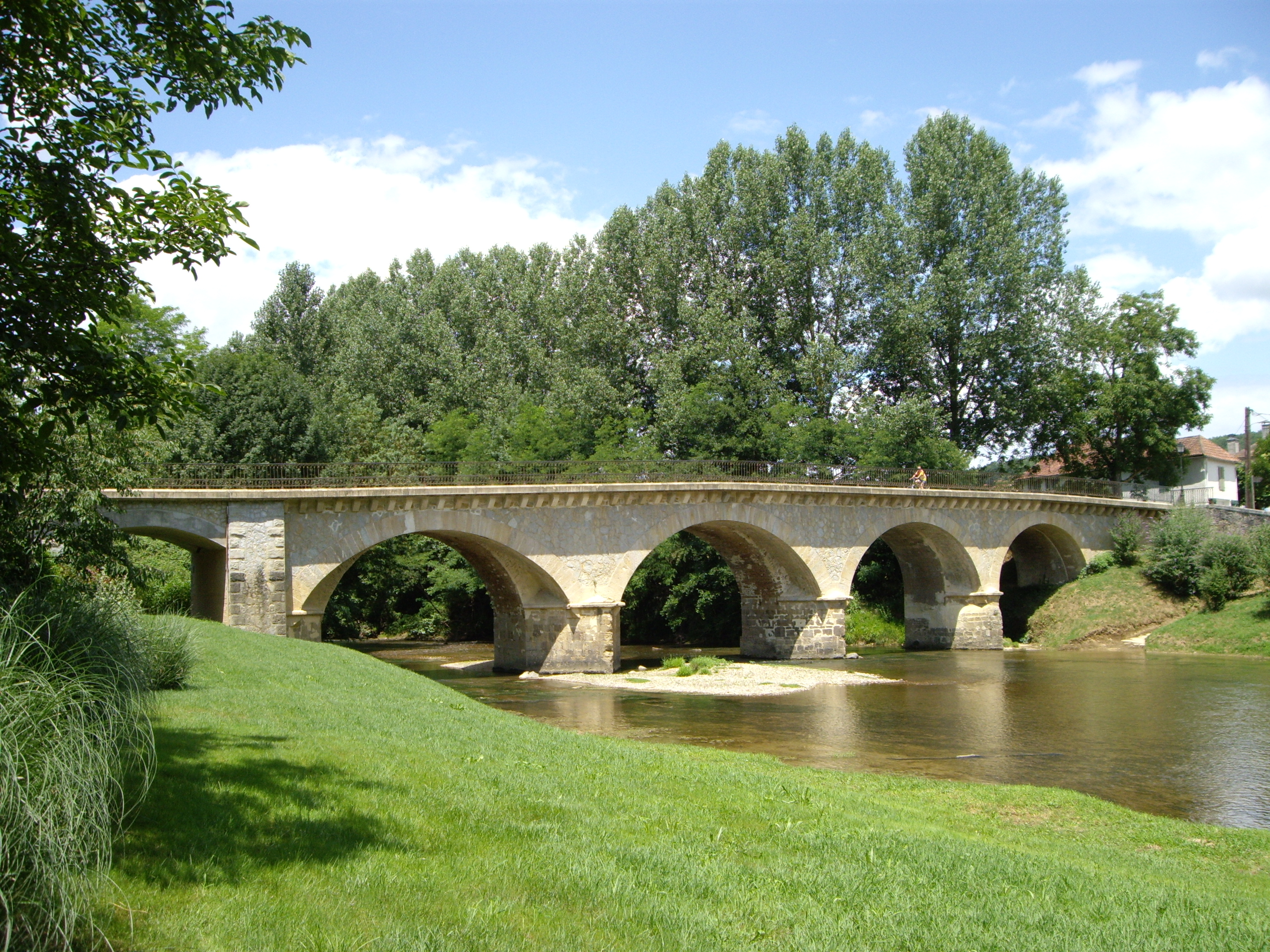 Bridge, Saint-Sever-de-Rustan, Hautes-Pyrénées, France